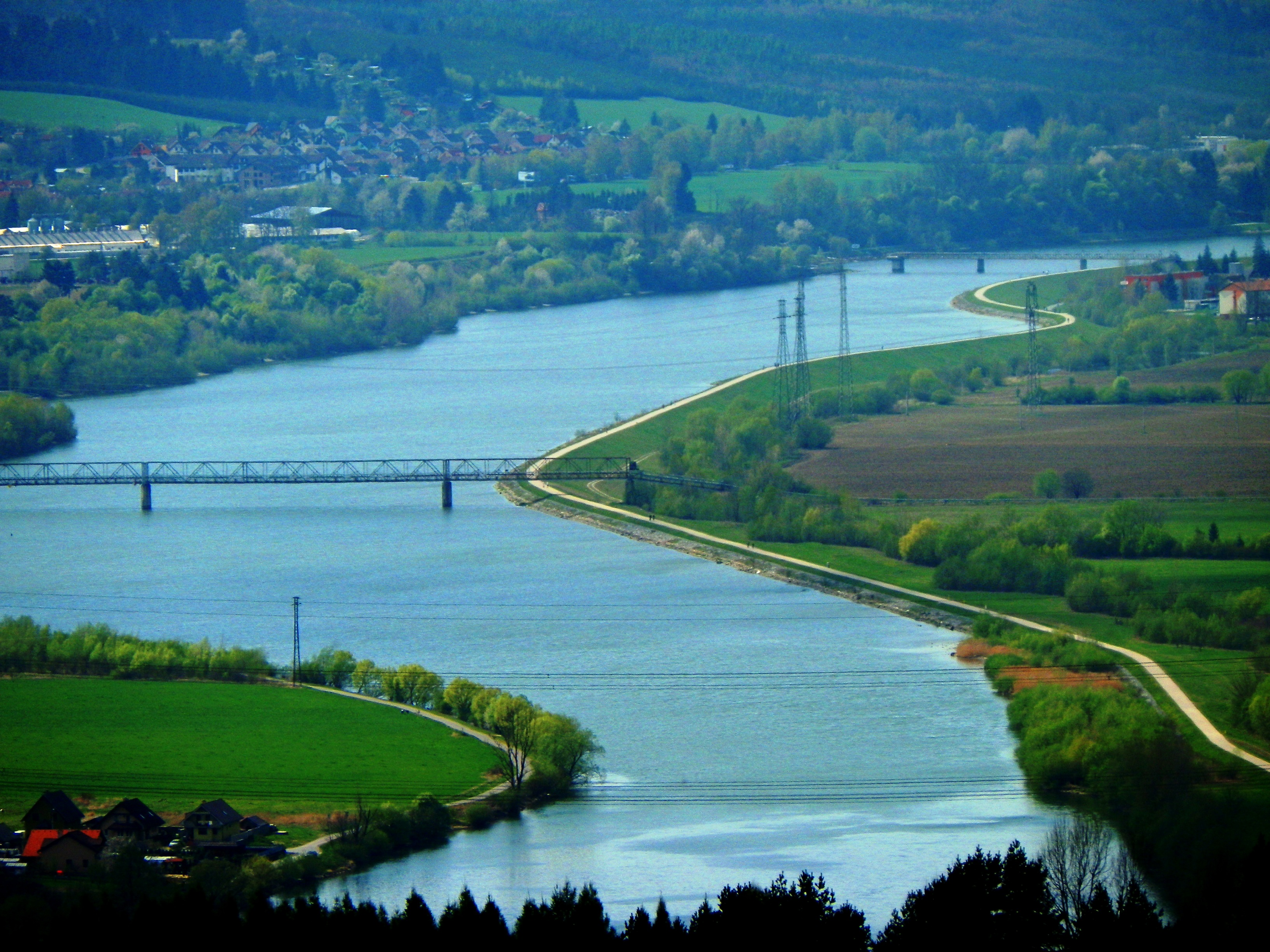 Váh